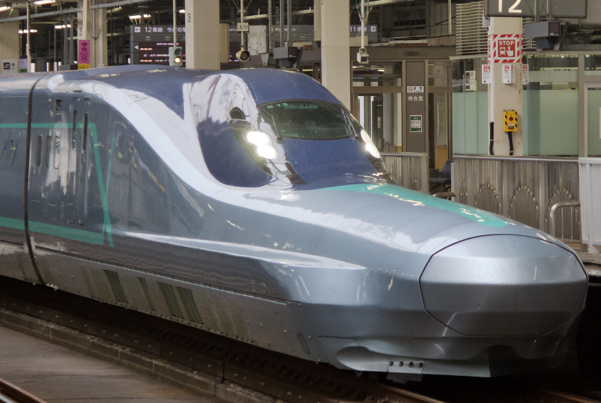 E956-10 2020年6月6日仙台駅にて撮影